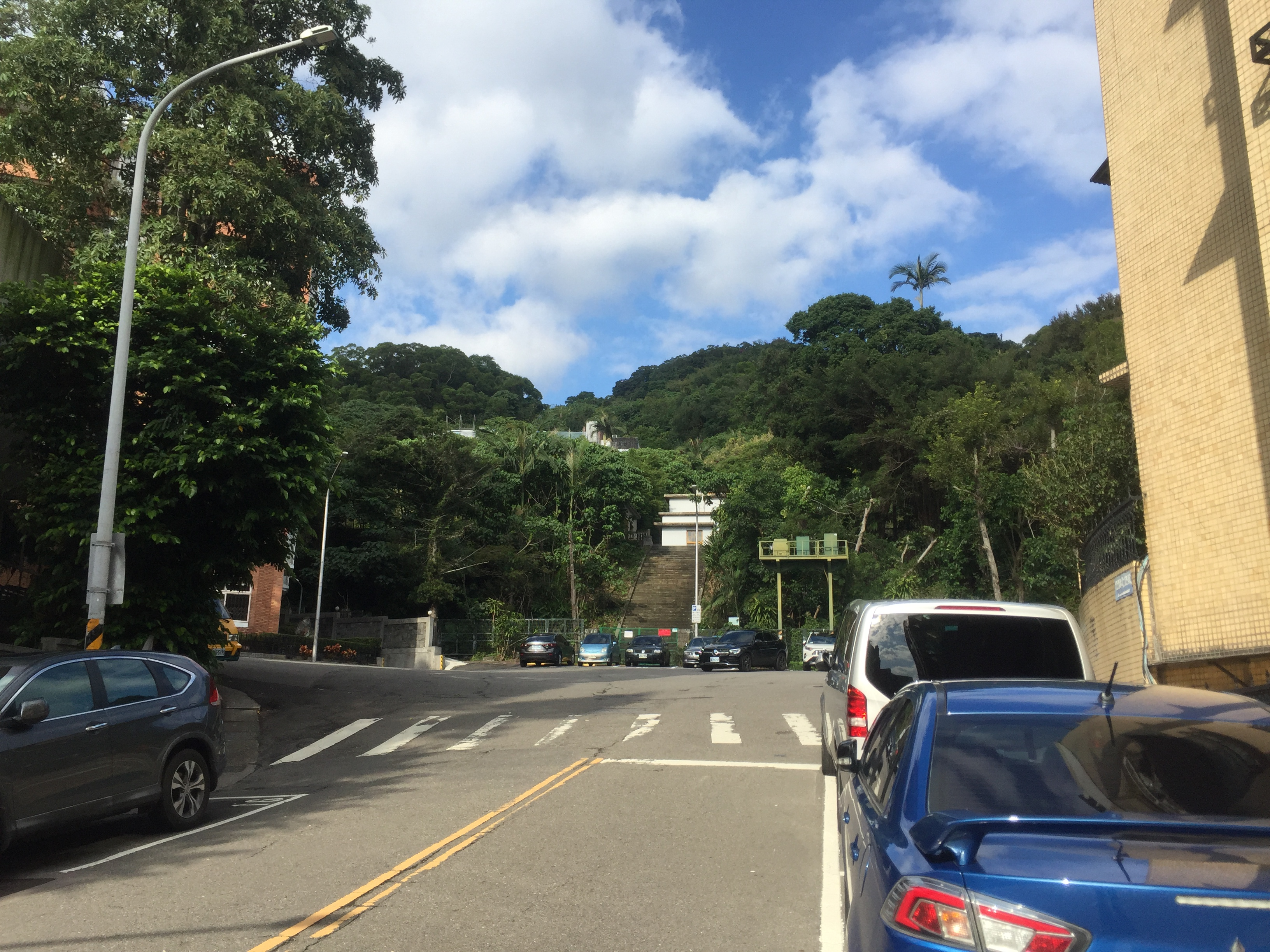 台北市士林區中山北路七段（230號）底，水管古道入口前